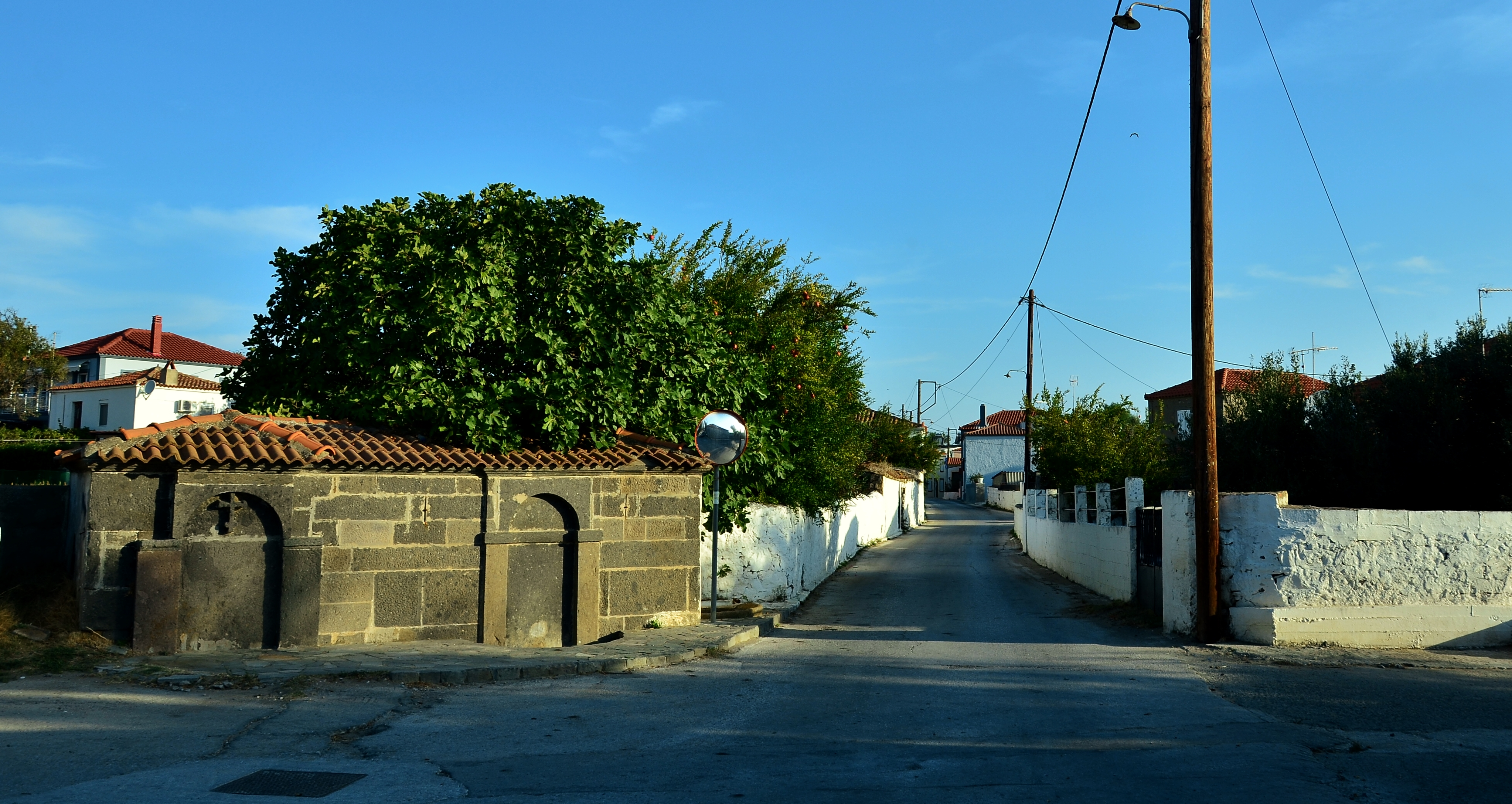 Εικόνα απο το Ρεπανίδι Αδειοδότηση Το παραπάνω αρχείο διανέμεται υπό τις δύο παρακάτω άδειες χρήσης. Μπορείτε να επιλέξετε την άδεια της προτίμησής σας.